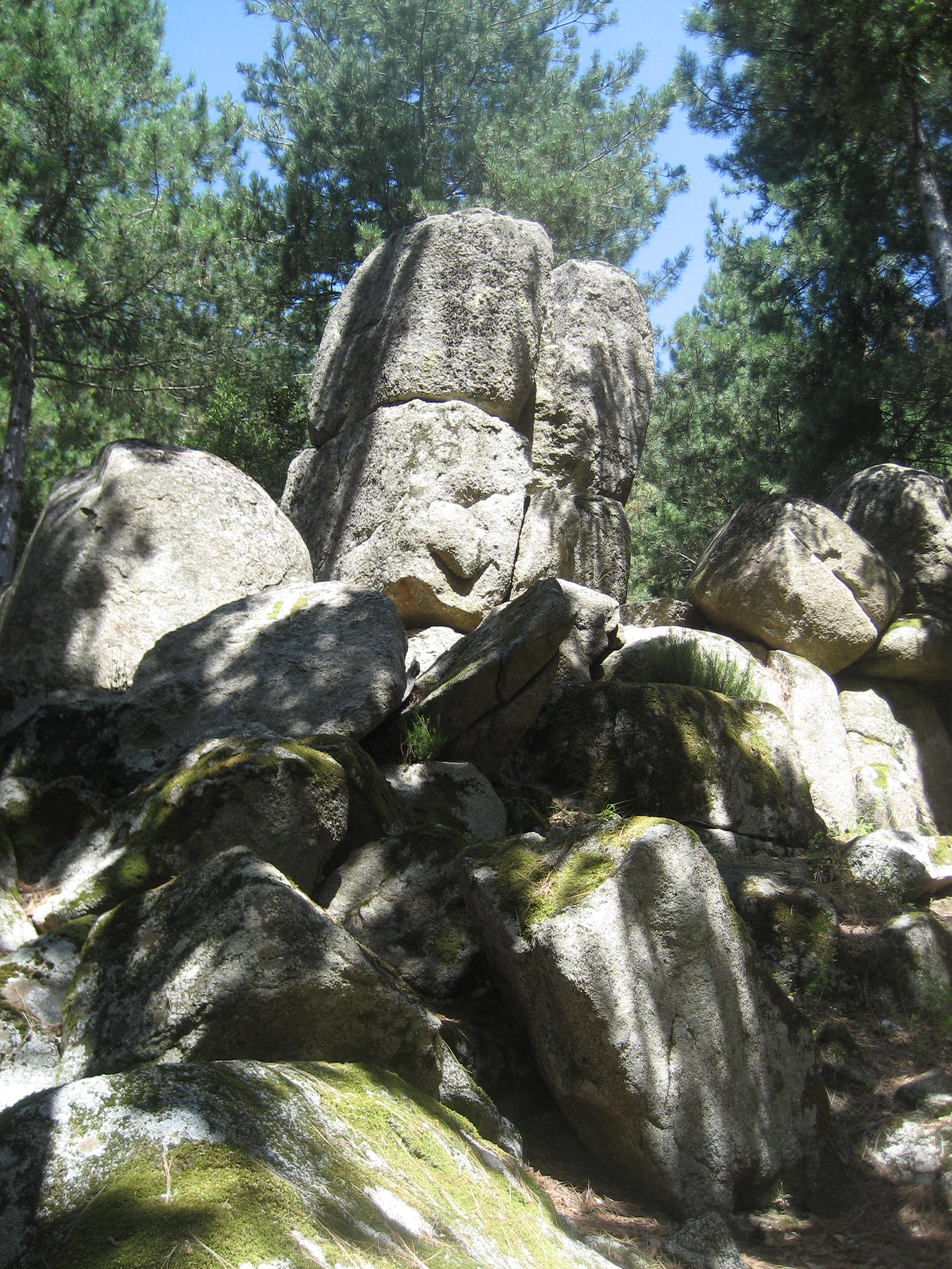 Pietre neolitiche geosito A